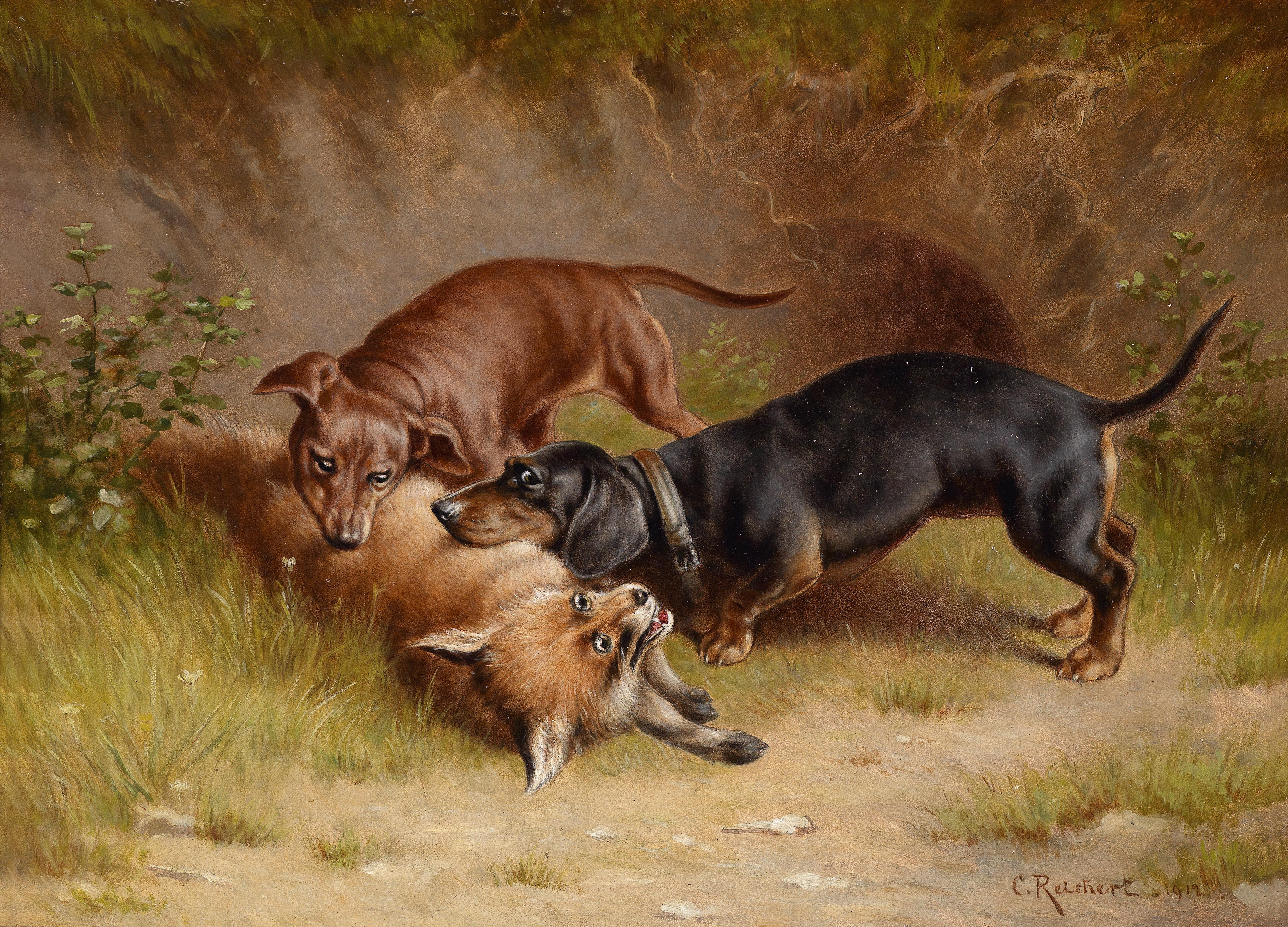 Jagdbeute